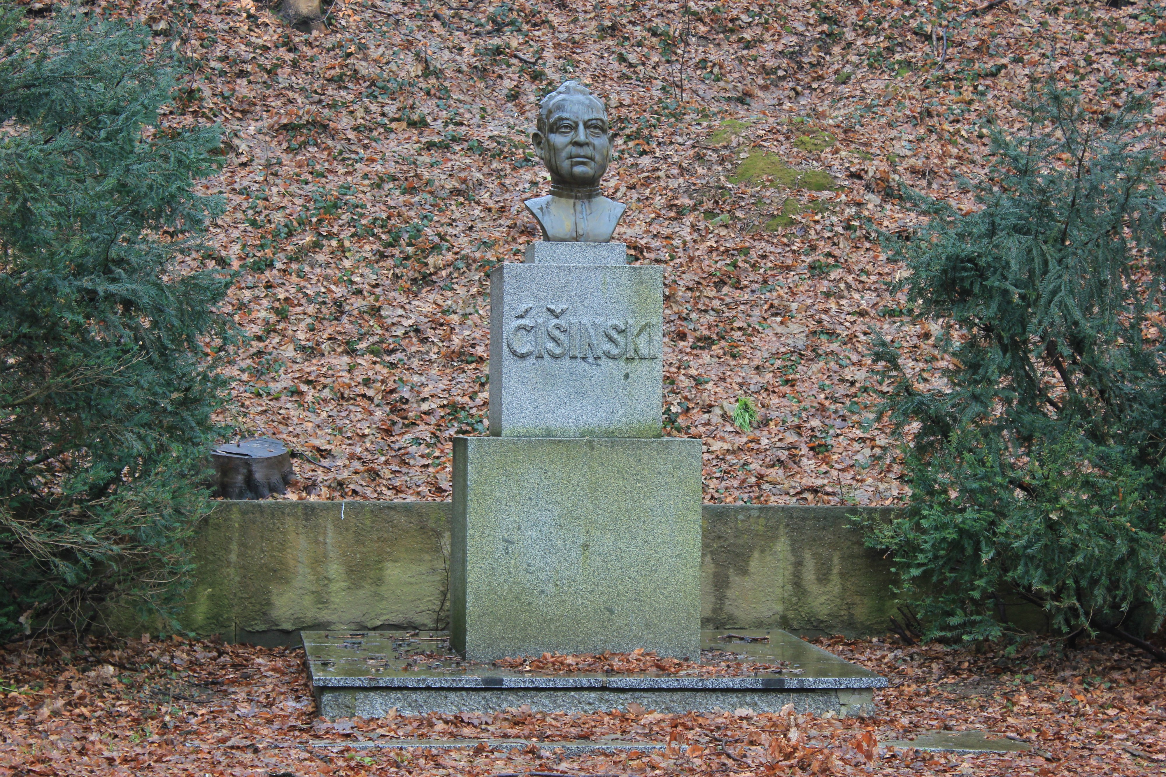 Hornjoserbsce: Pomnik Jakuba Barta-Ćišinskeho w Lipju.